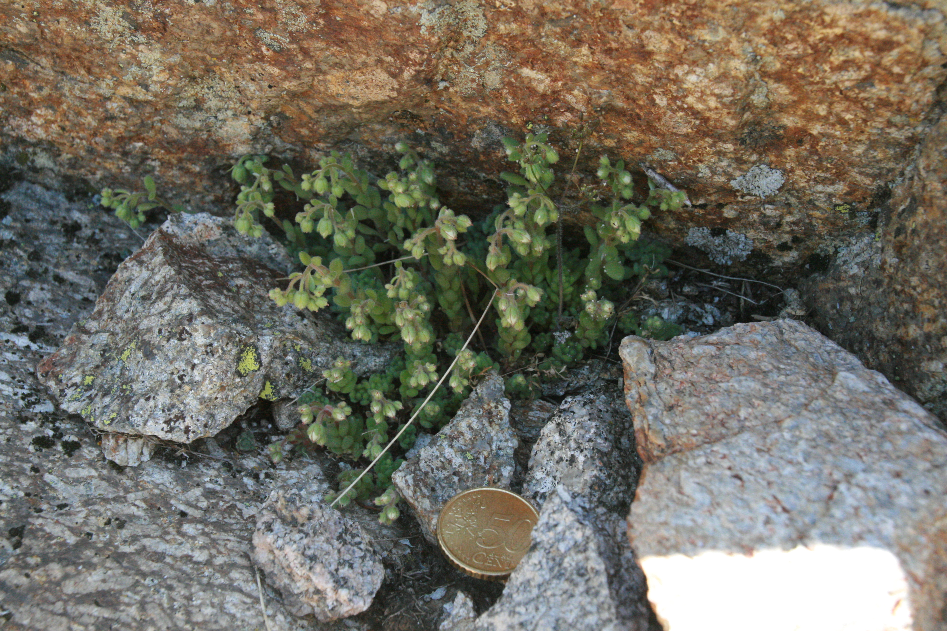 Flora en las inmediaciones de la Laguna Grande del Circo de Gredos en la Sierra de Gredos. España